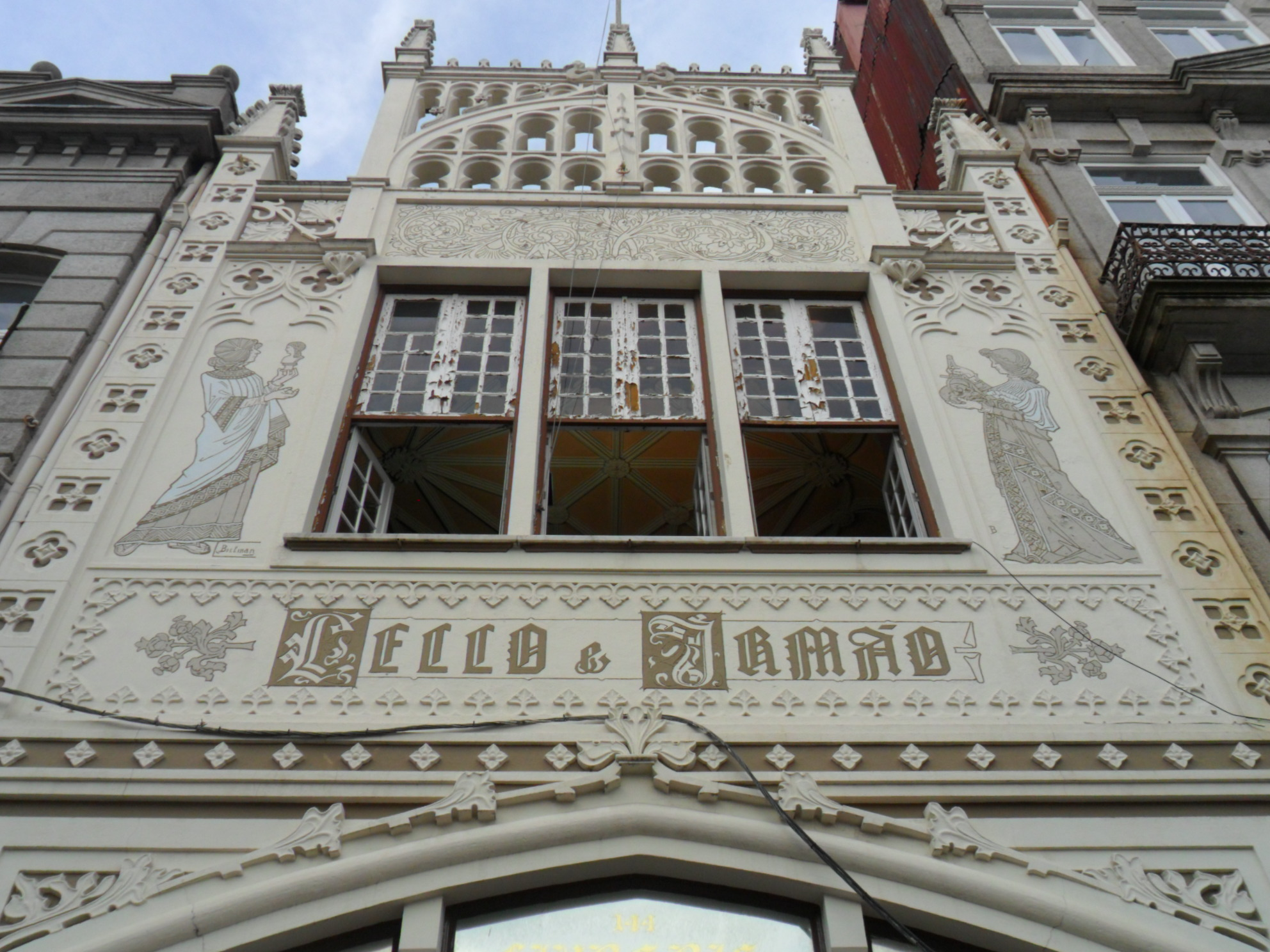 Livraria Lello e Irmão, na Rua das Carmelitas nº 144. Em Portugal, Porto, Porto, Vitória. This file was uploaded for Wiki Loves Monuments in Portugal with the unique identifier 72272.